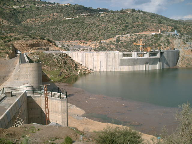 Tichy Haf